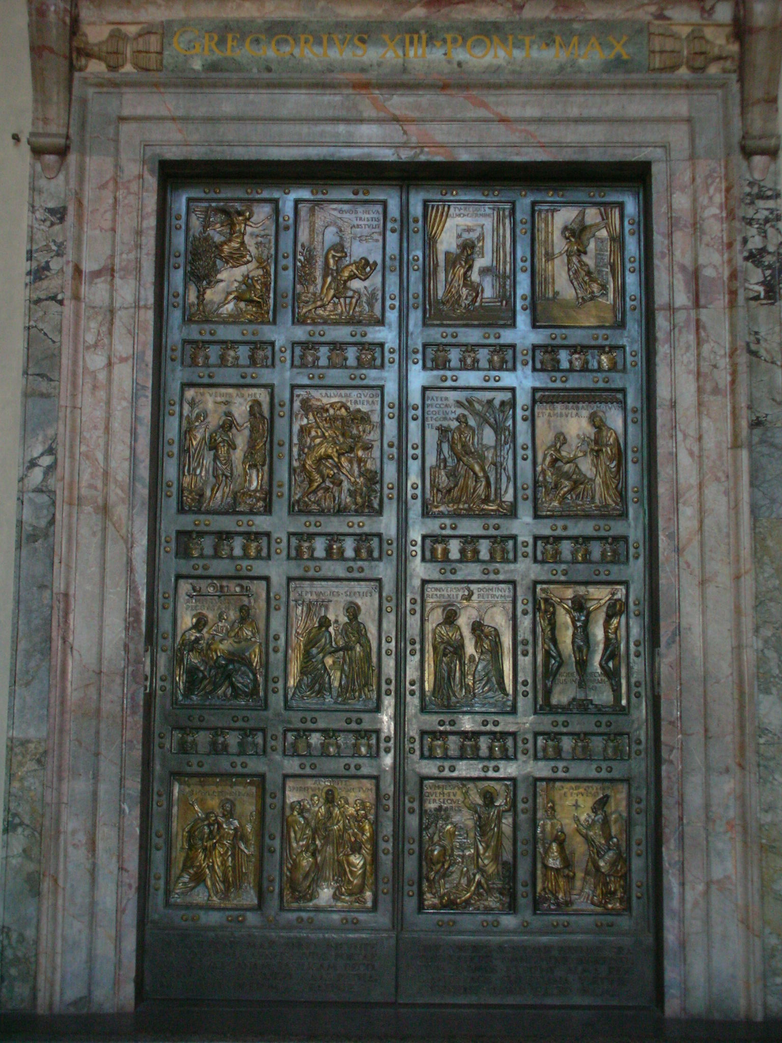 Porta Santa, bronze, Basilica di San Pietro (Roma); sculptor Vico Consorti